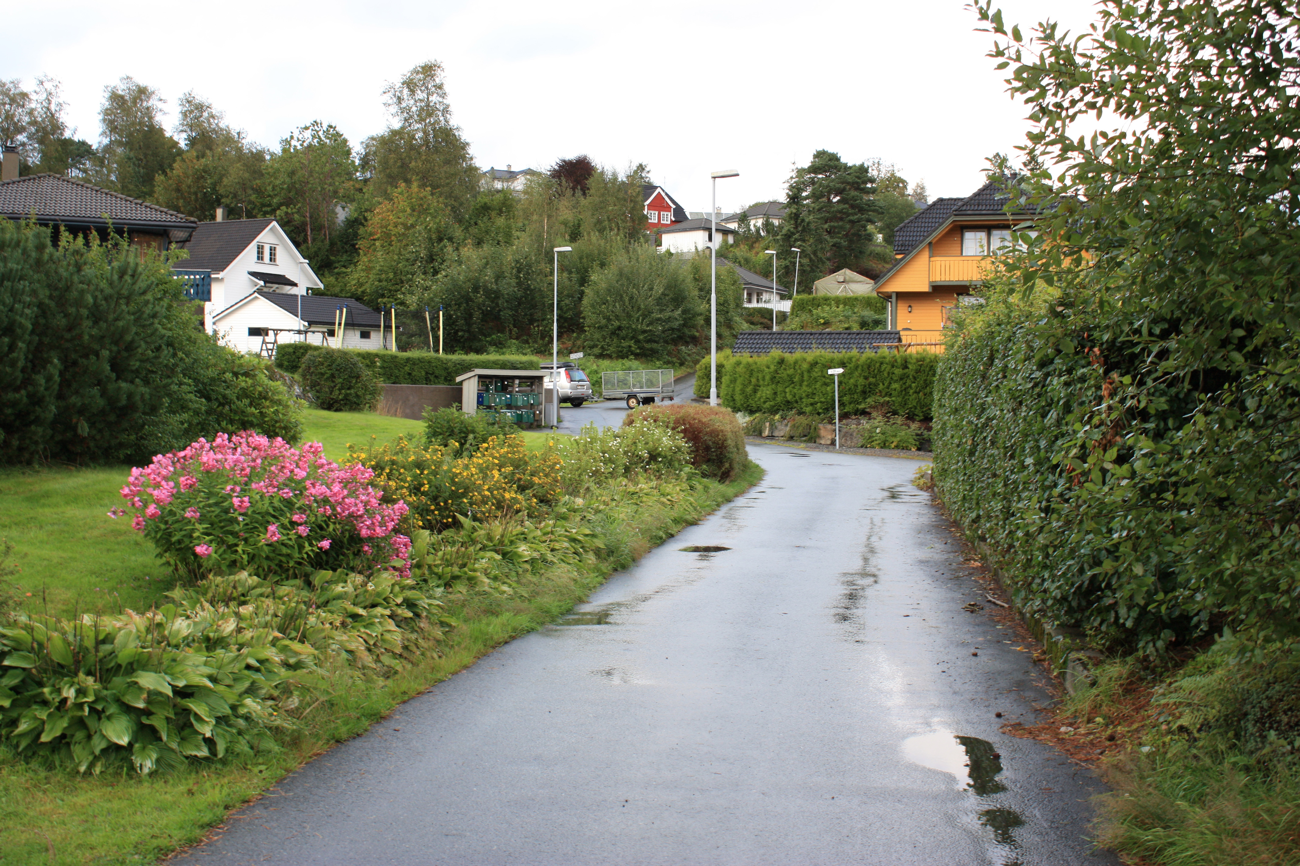 Elgvegen, Fana, Bergen.